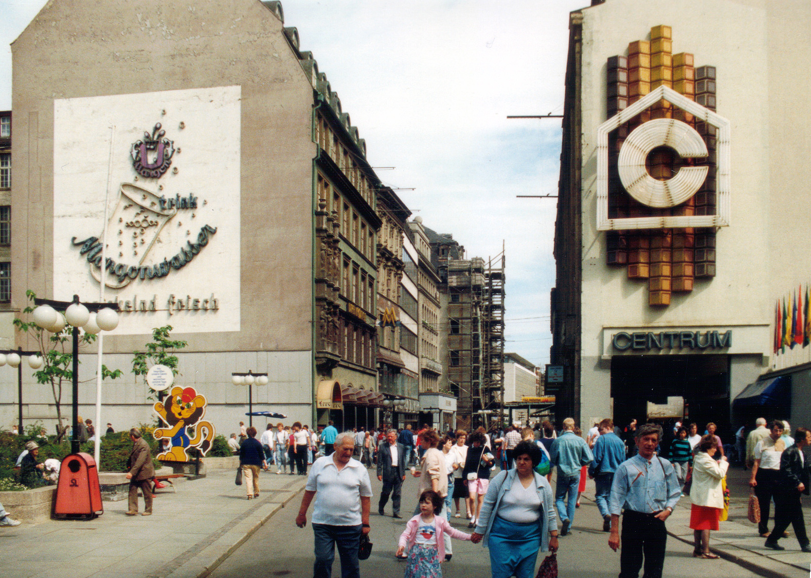 Leipzig, DDR, 1989, Petersstraße, Blick in Richtung Marktlinks: Messehaus „Drei Könige“, rechts: Centrum-Warenhaus, mit Leuchtreklame an den Giebelwänden